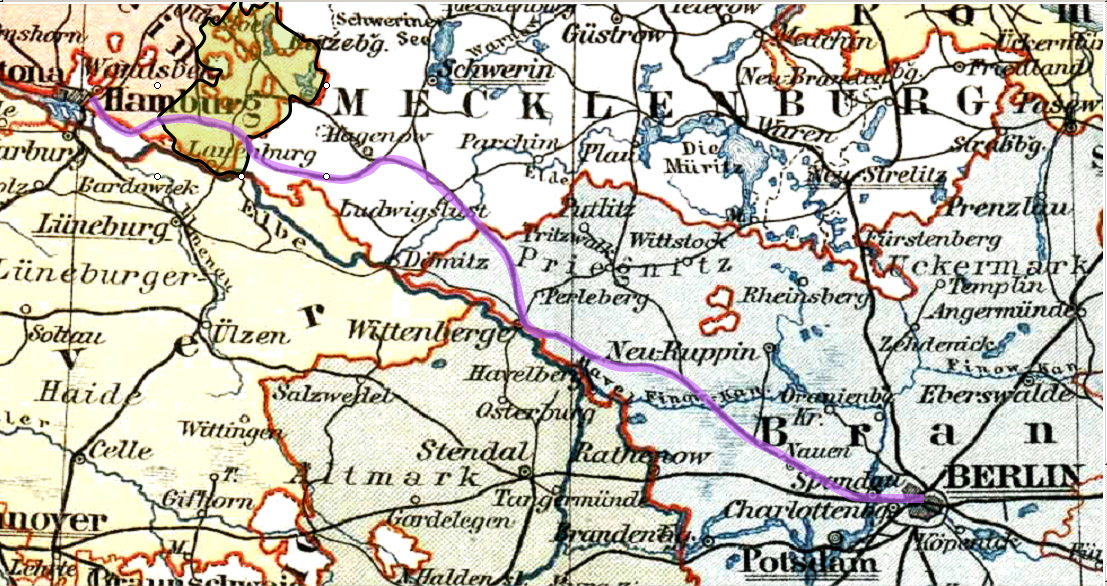 Strecke der Berlin-Hamburger Bahn.